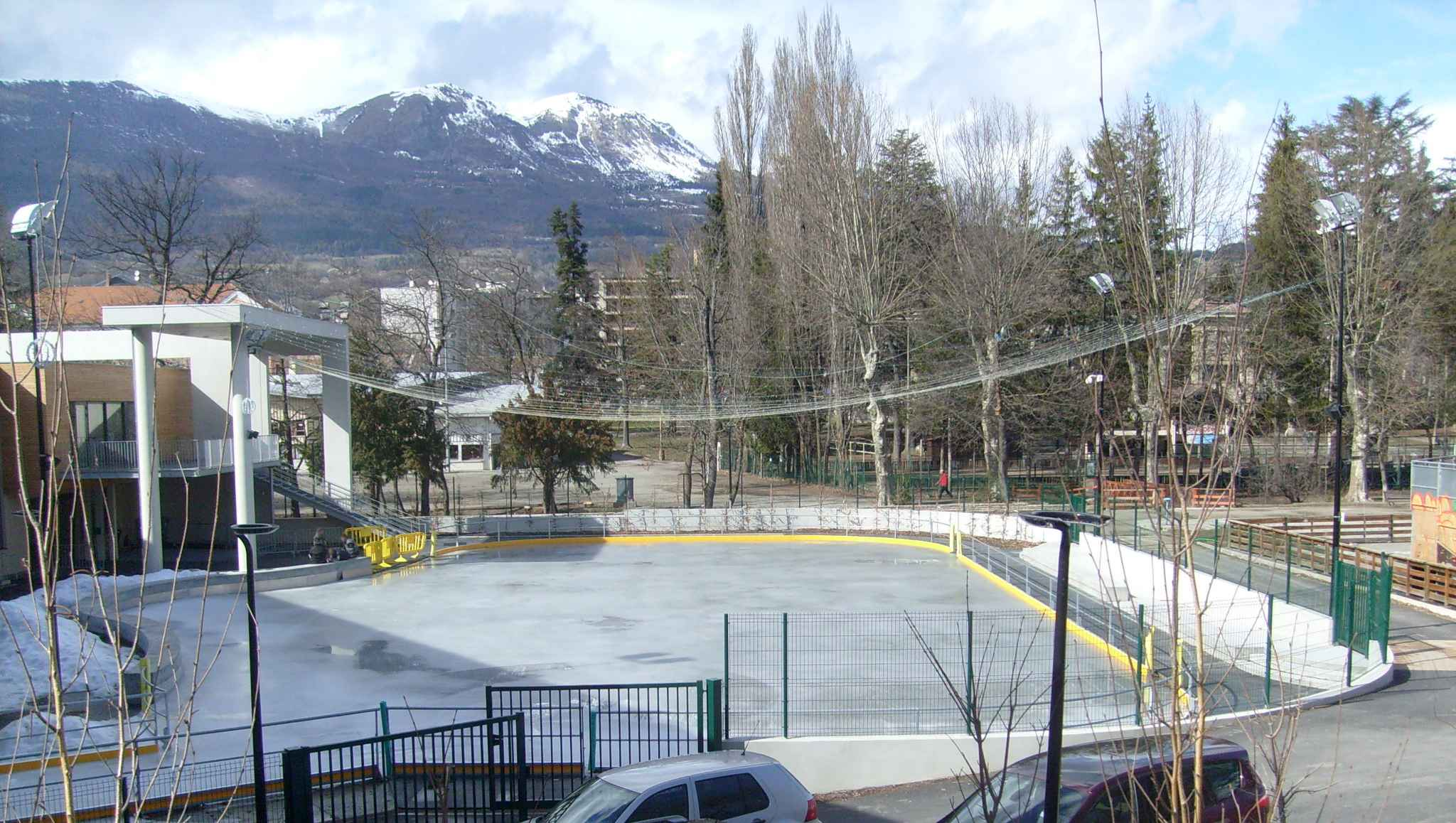 Alp'Arena( piste ludique extérieure)